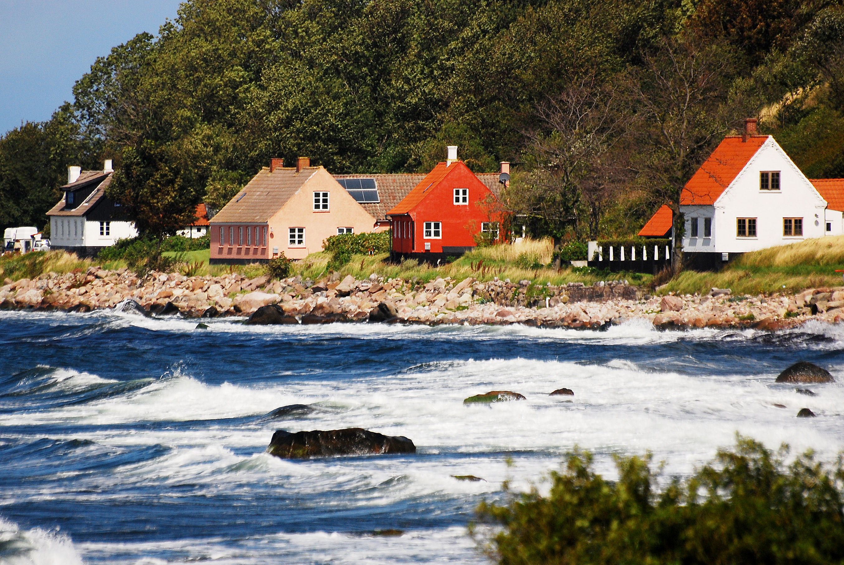 Wybrzeże